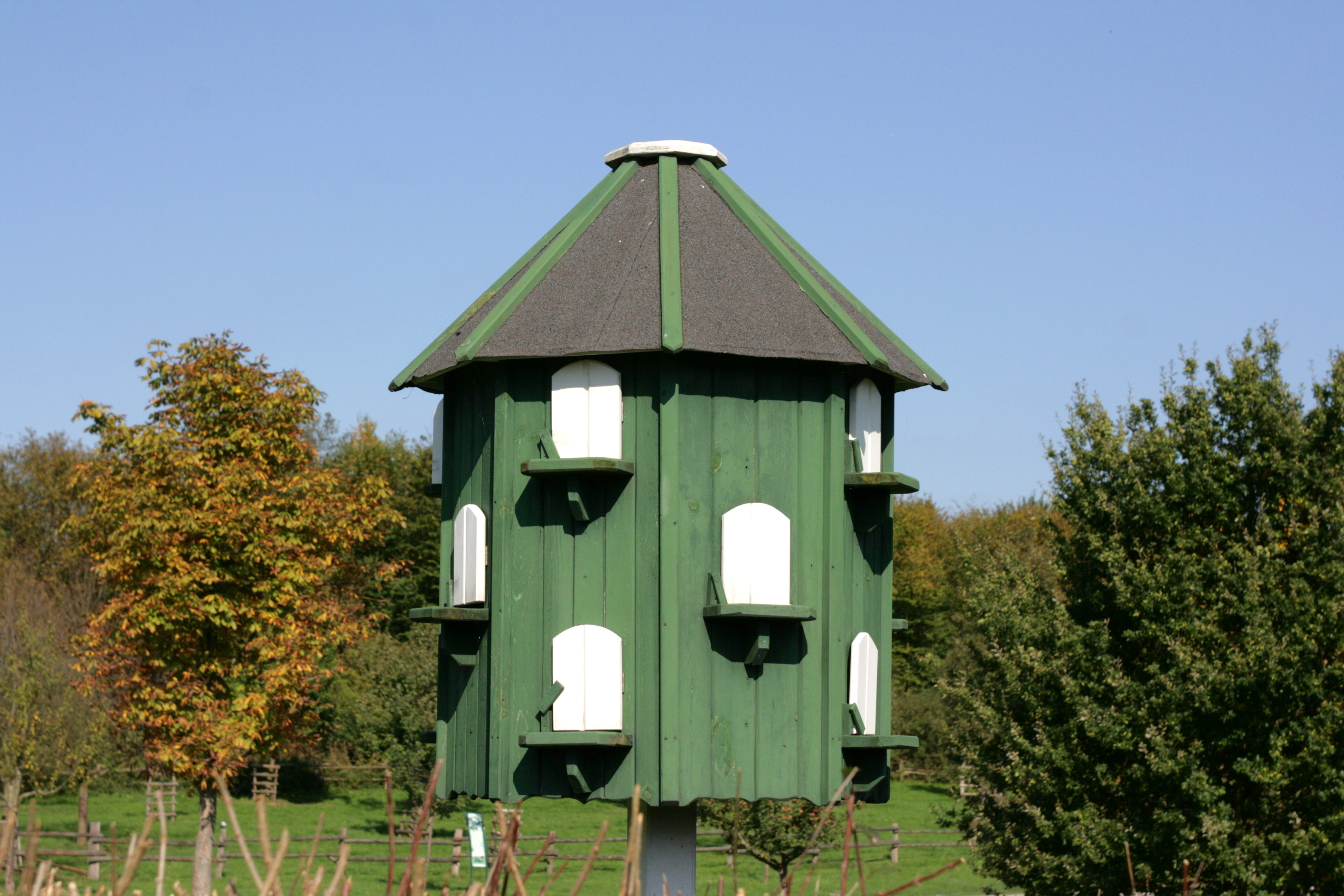 Bergisches Freilichtmuseum Lindlar